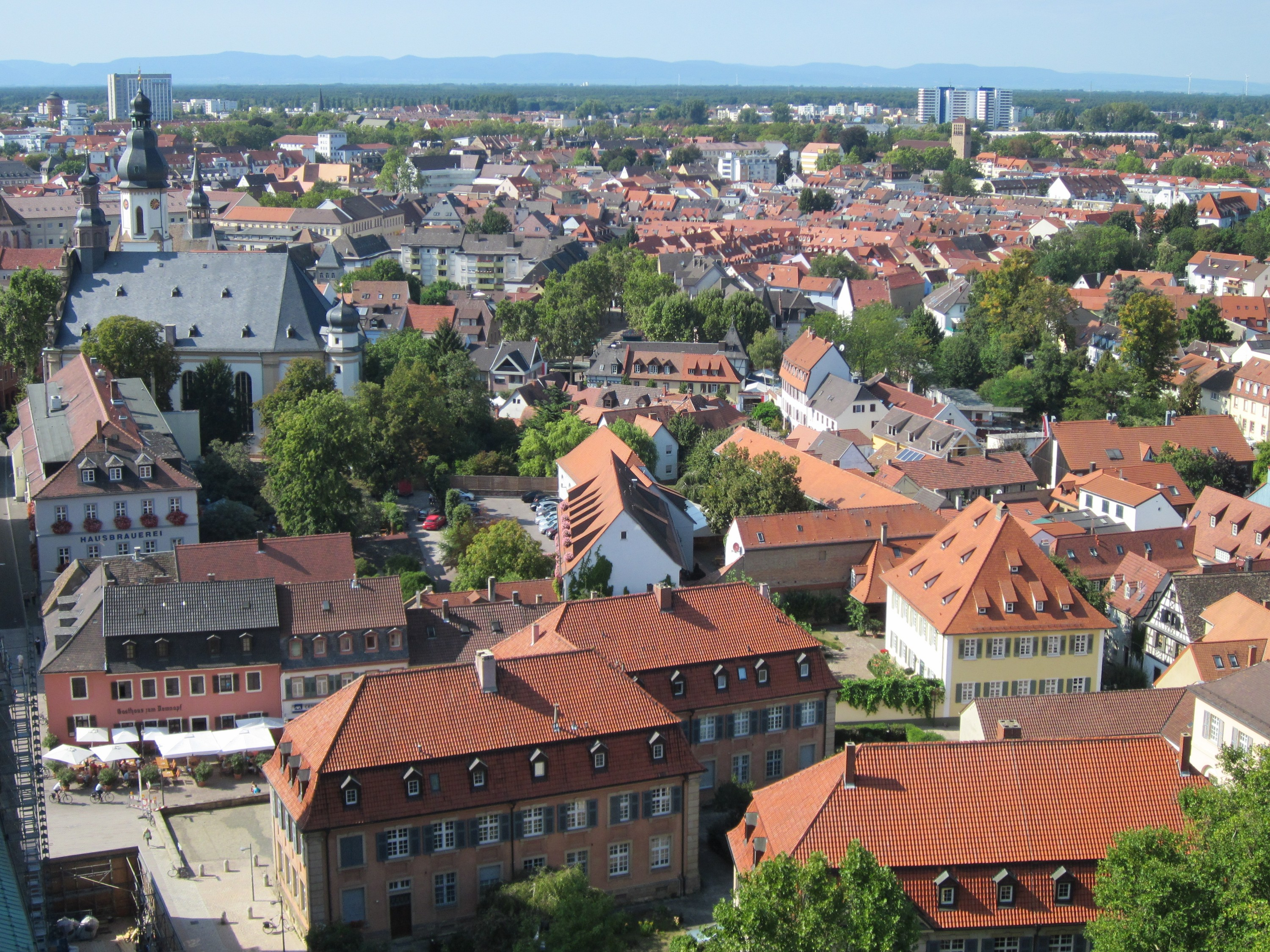 Speyerer Dom: Blick auf die Dreifaltigkeitskirche und den Läutturm von St. Georg